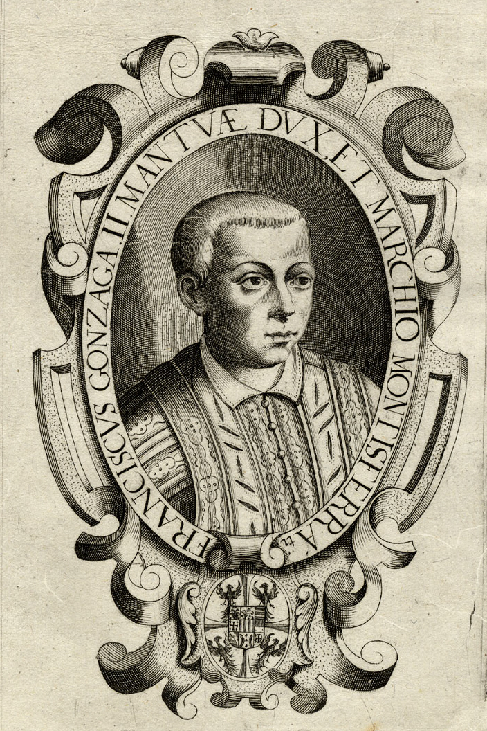 Portrait aus einer Serie von Gonzaga-Portraits, Kupferstich, 17. Jh.; Francesco II.